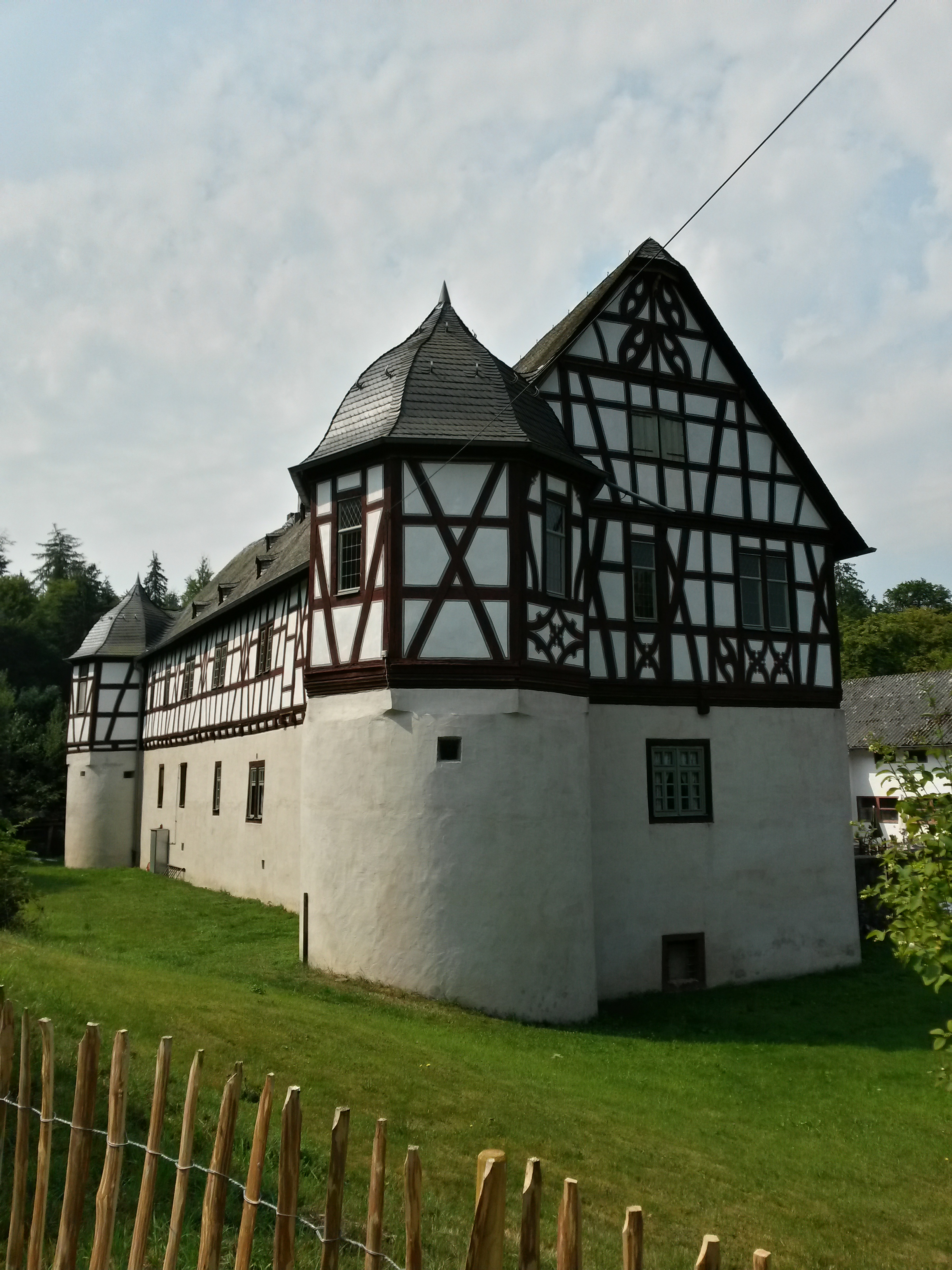 Eichelbacher Hof in Rod an der Weil (Weilrod), Außerhalb der Ortslage: ehemalige Renaissance-Wasserburg unbekannter ständischer Zuordnung, gut erhaltenes Herrenhaus, aus dessen massivem Erdgeschoss zwei runde Ecktürme vorspringen, war einst der Ostflügel eines viertürmigen Renaissanceschlosses. Ansicht von Nordosten.